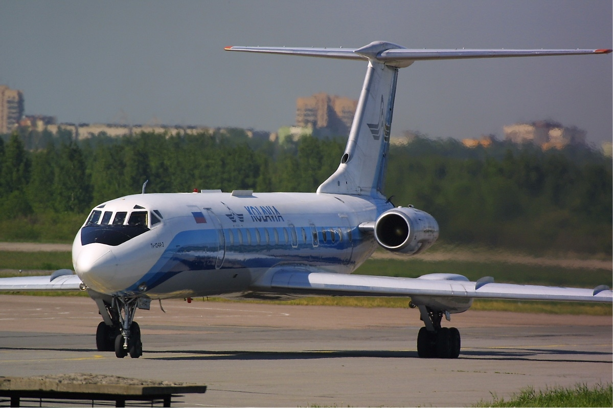 RA-65942, Kolavia Tupolev Tu-134, Pulkovo Airport